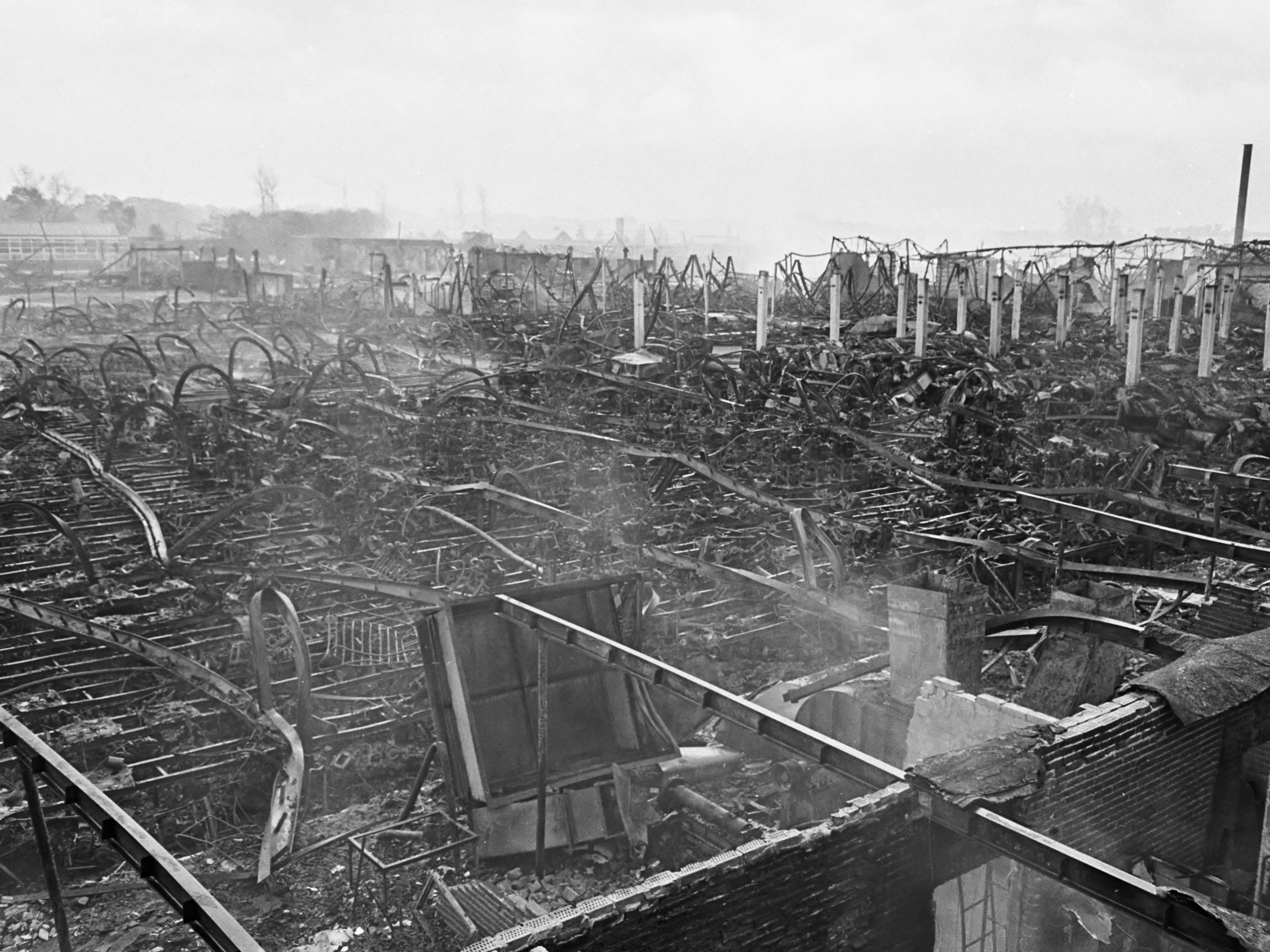 Brand in Emmen. Overzicht van de vernieling in fabriek van Danlon 16 oktober 1967